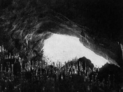 Potočka zijalka, pogled iz notranjosti proti izhodu